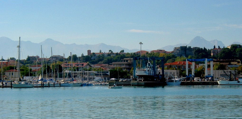 Giulianova, Abruzzo, Italia